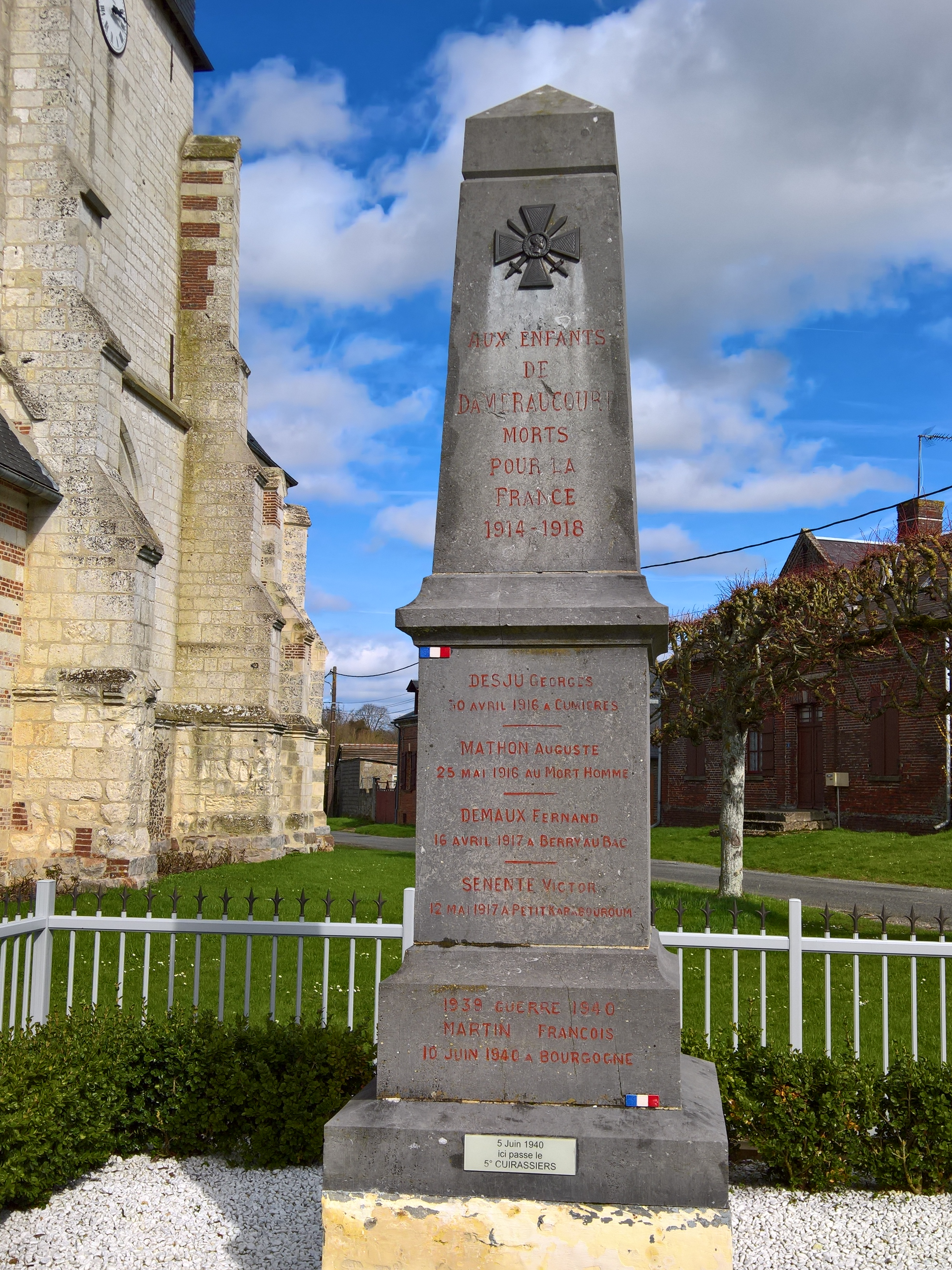 Daméraucourt : Le monument aux morts